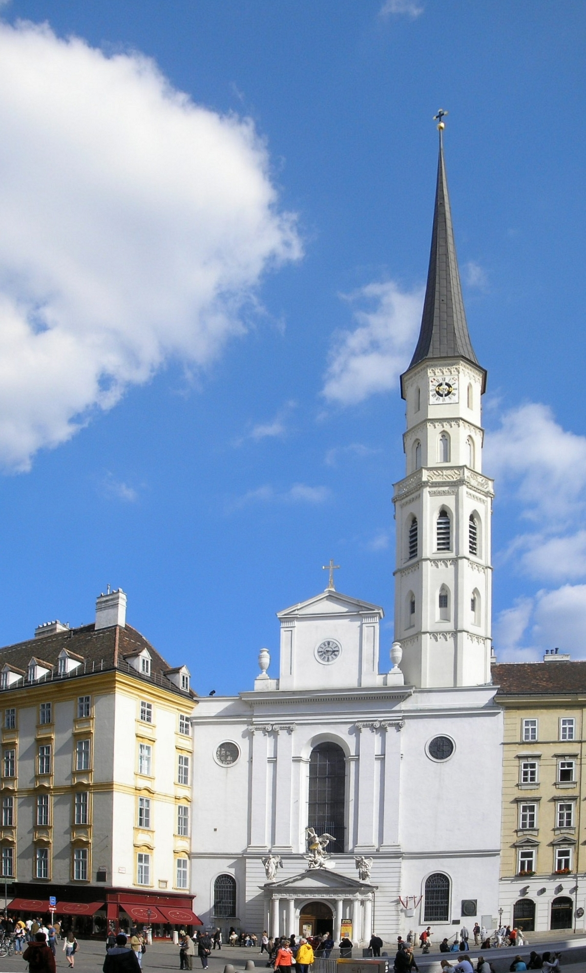 Michaelerkirche in Vienna